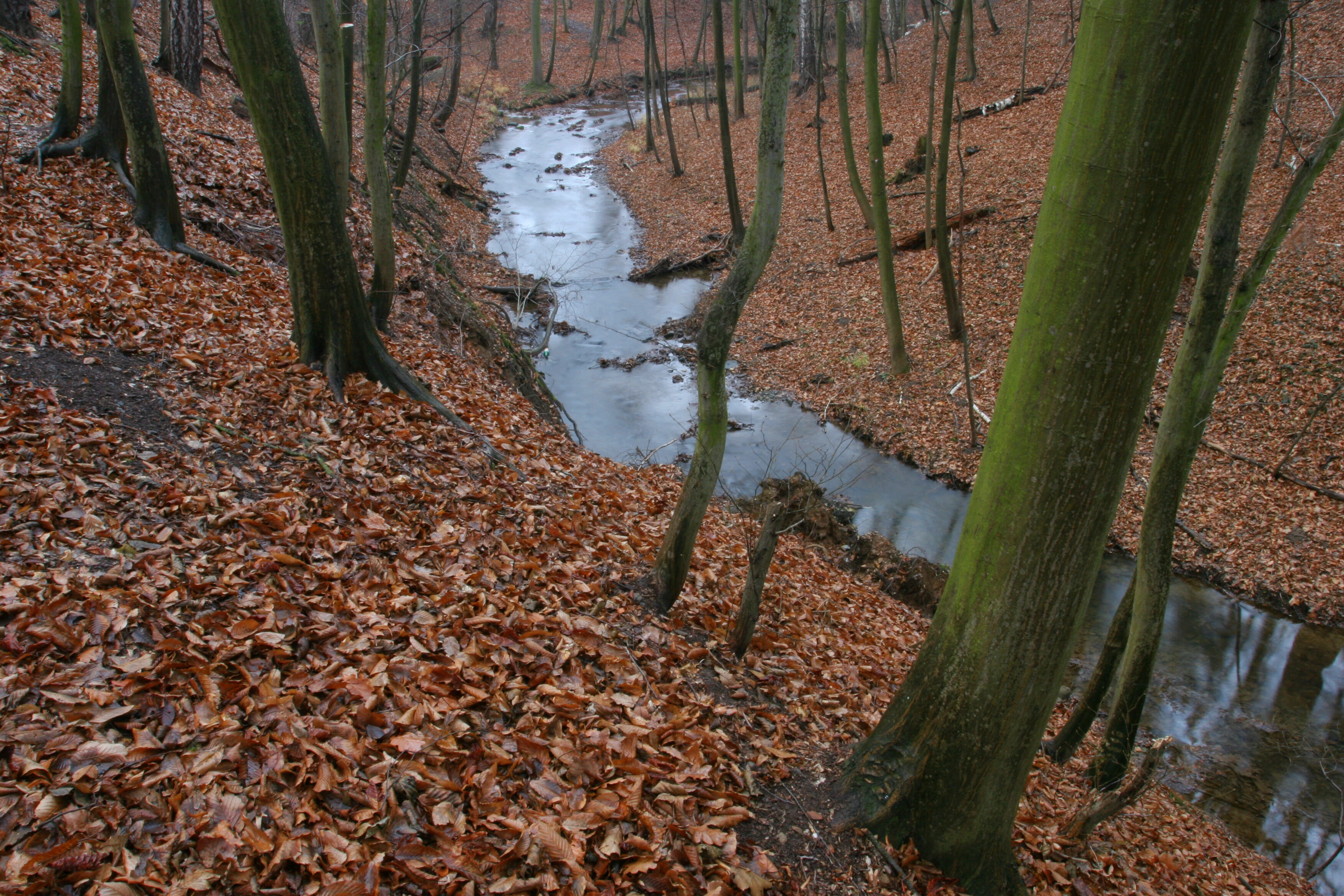 potok Struha v Choltické oboře